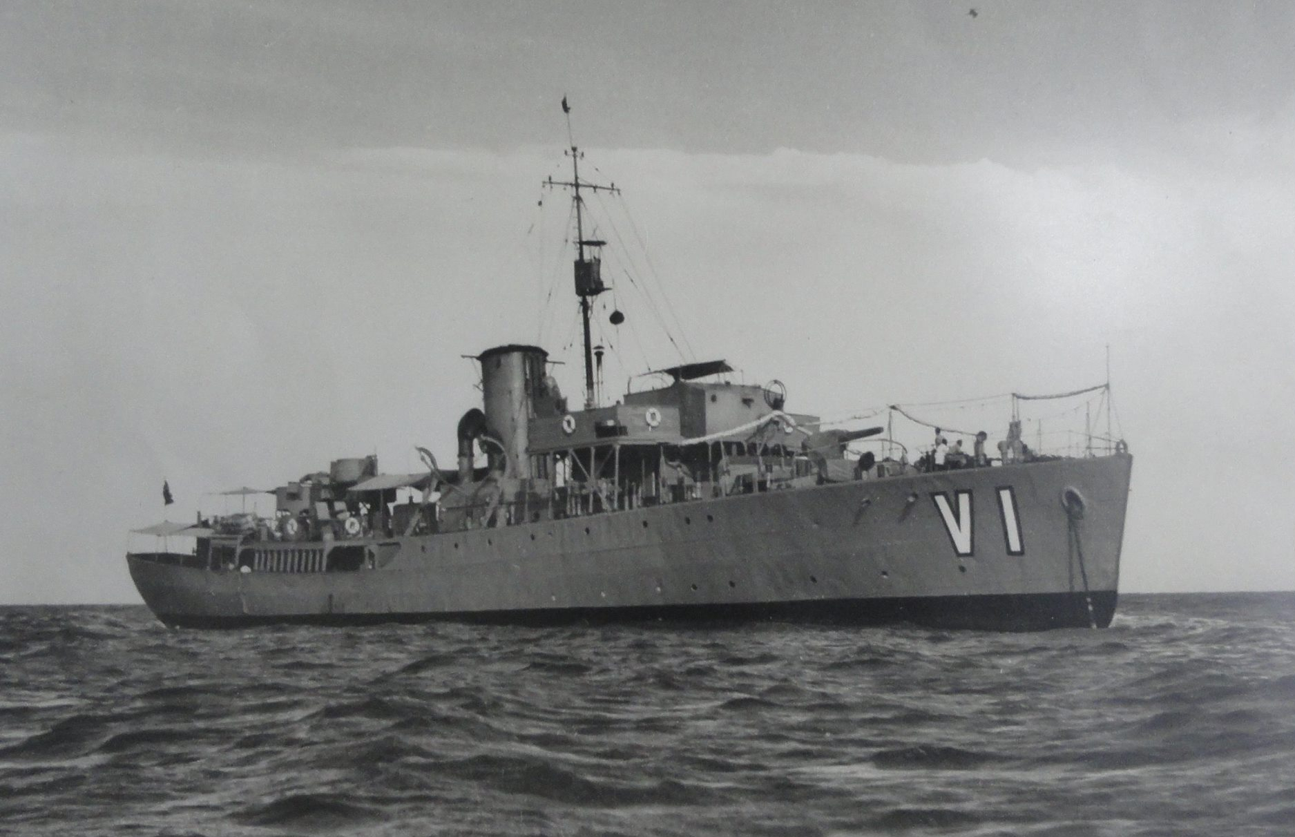 Corbeta FNV Victoria a principio de la década del 50